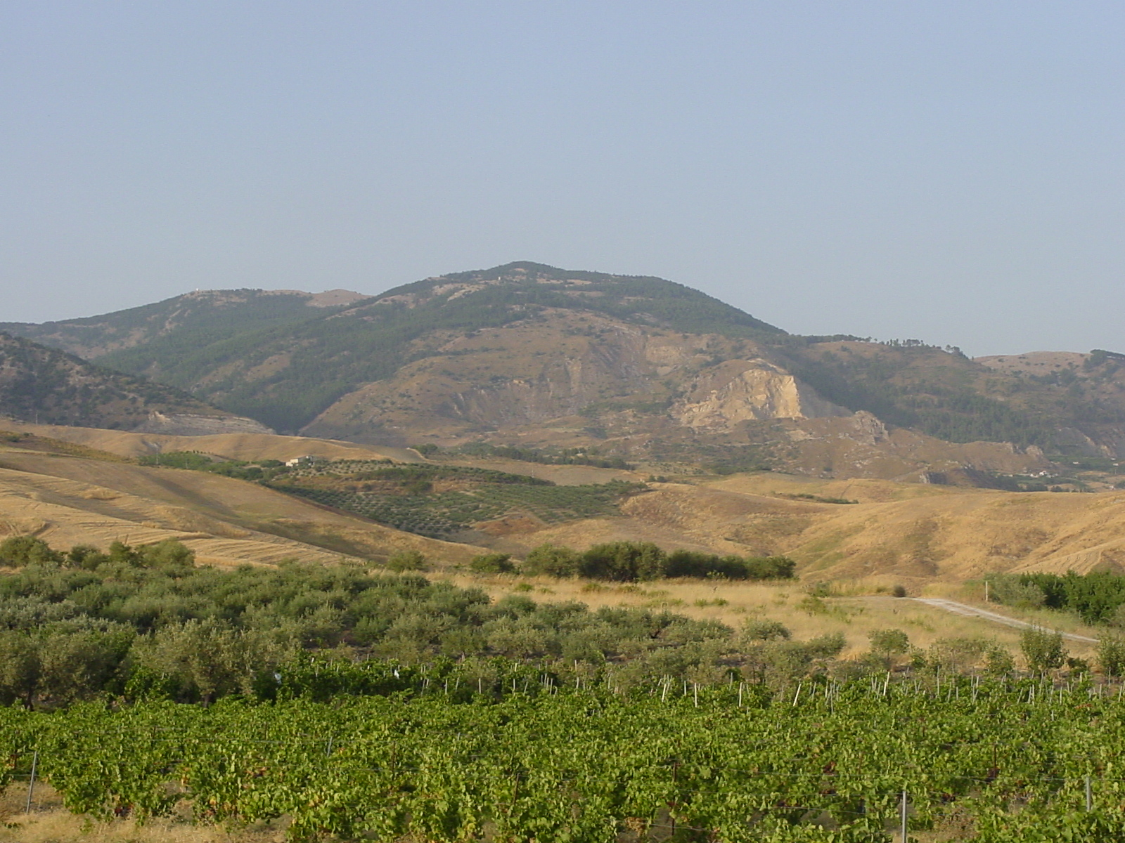 Il Monte delle Rose (versante agrigentino)